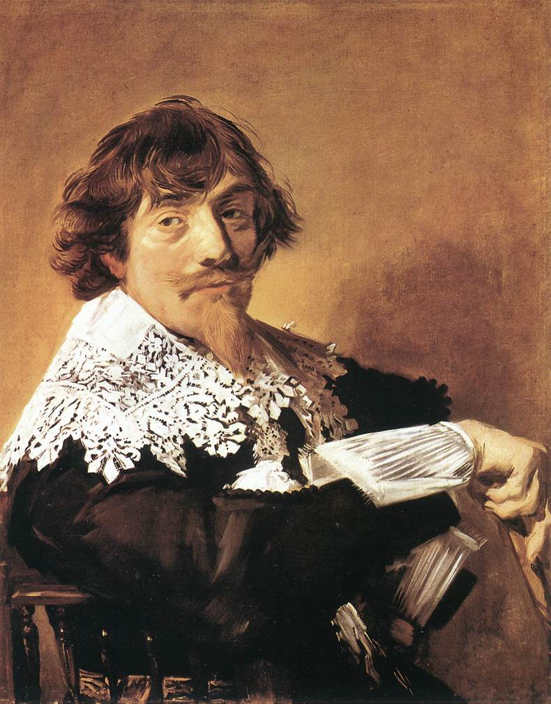 Pendant of File:Frans Hals 028.jpg